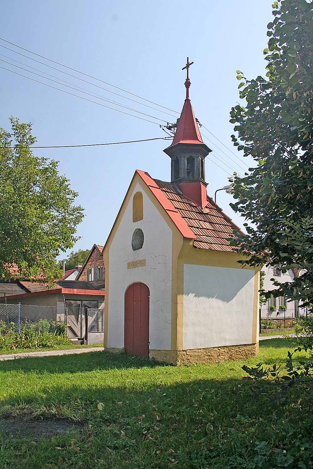 Kaplička v osadě Hlína, Chrudim District, Czech Republic autor:Prazak date: 14. 9. 2006